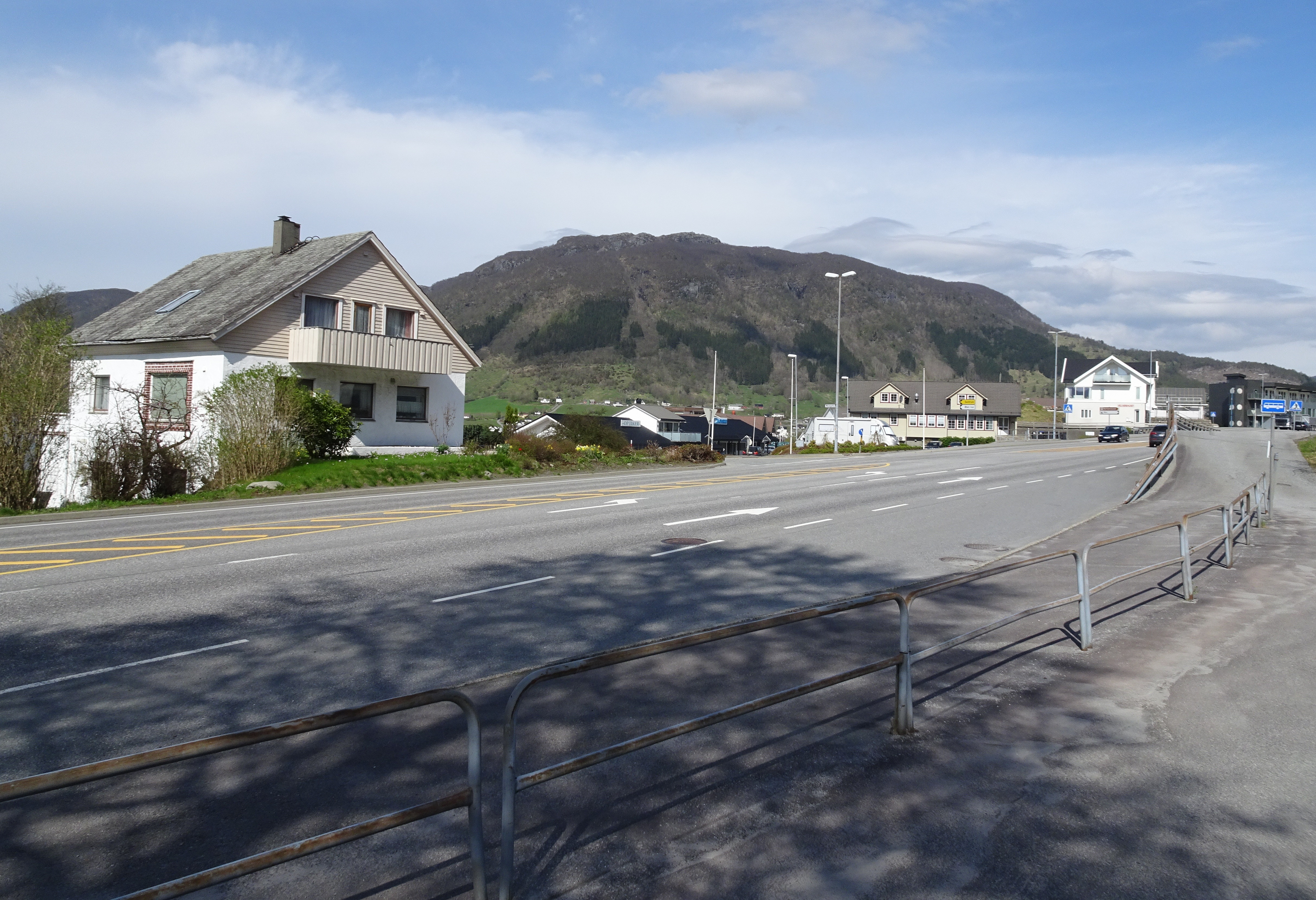 E134 gjennom Ølen